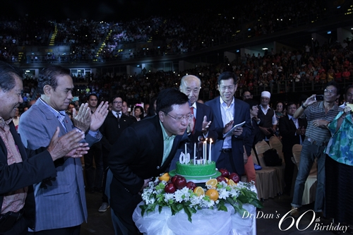 ประมวลภาพงาน "Dr.Dan's 60th Birthday : 60 ปี คนดีมีพลัง" โดยสมัชชาสยามอารยะ จัดขึ้นเนื่องในโอกาสวันคล้ายวันเกิดครบรอบ 60 ปี ของ ศ.ดร.เกรียงศักดิ์ เจริญวงศ์ศักดิ์ เมื่อวันอาทิตย์ที่ 6 กันยายน 2558 เวลา 14.00 – 16.30 น. ณ อิมแพค อารีน่าเมืองทองธานี